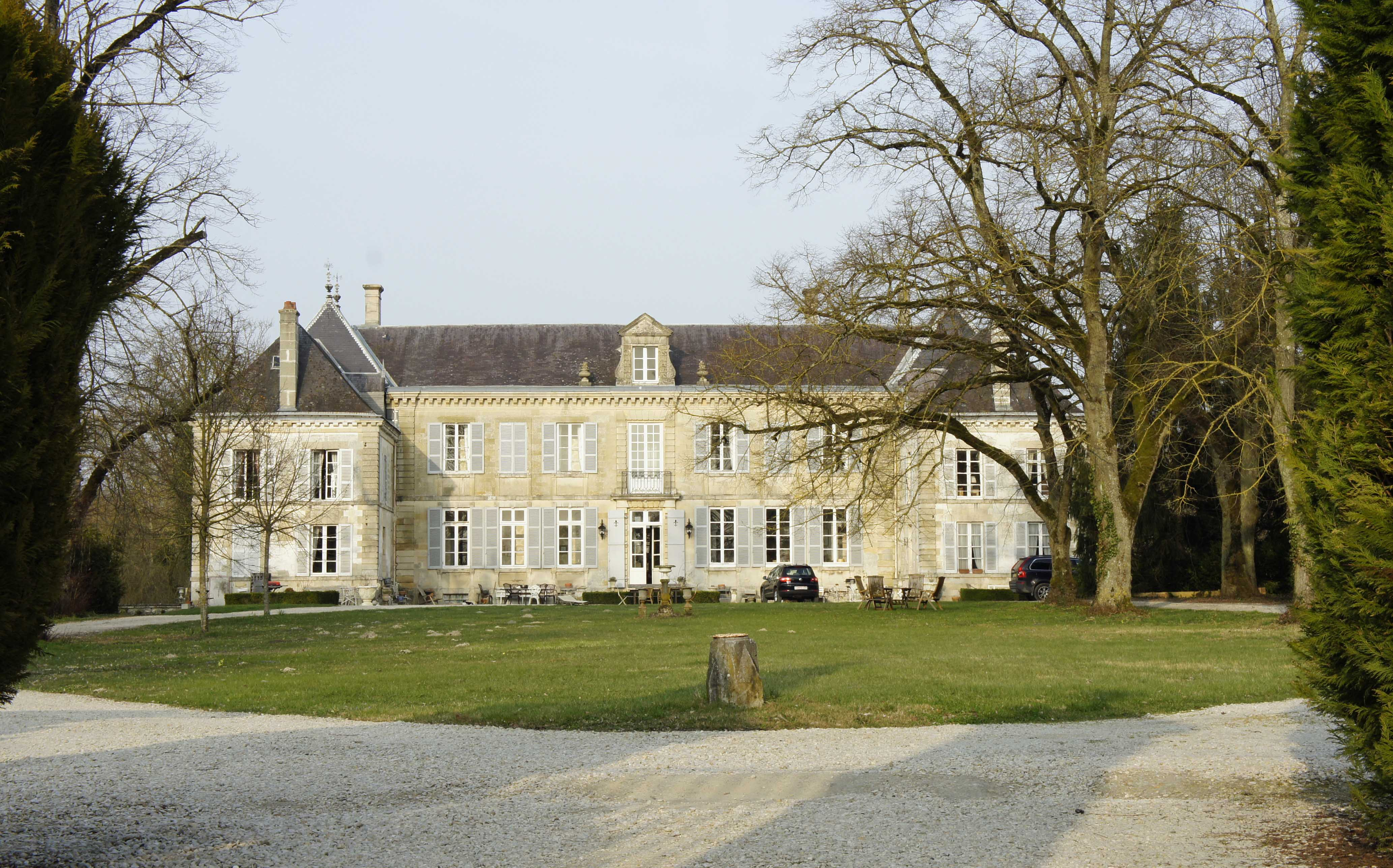 Le Château des Loisson à Mairy-sur-Marne .